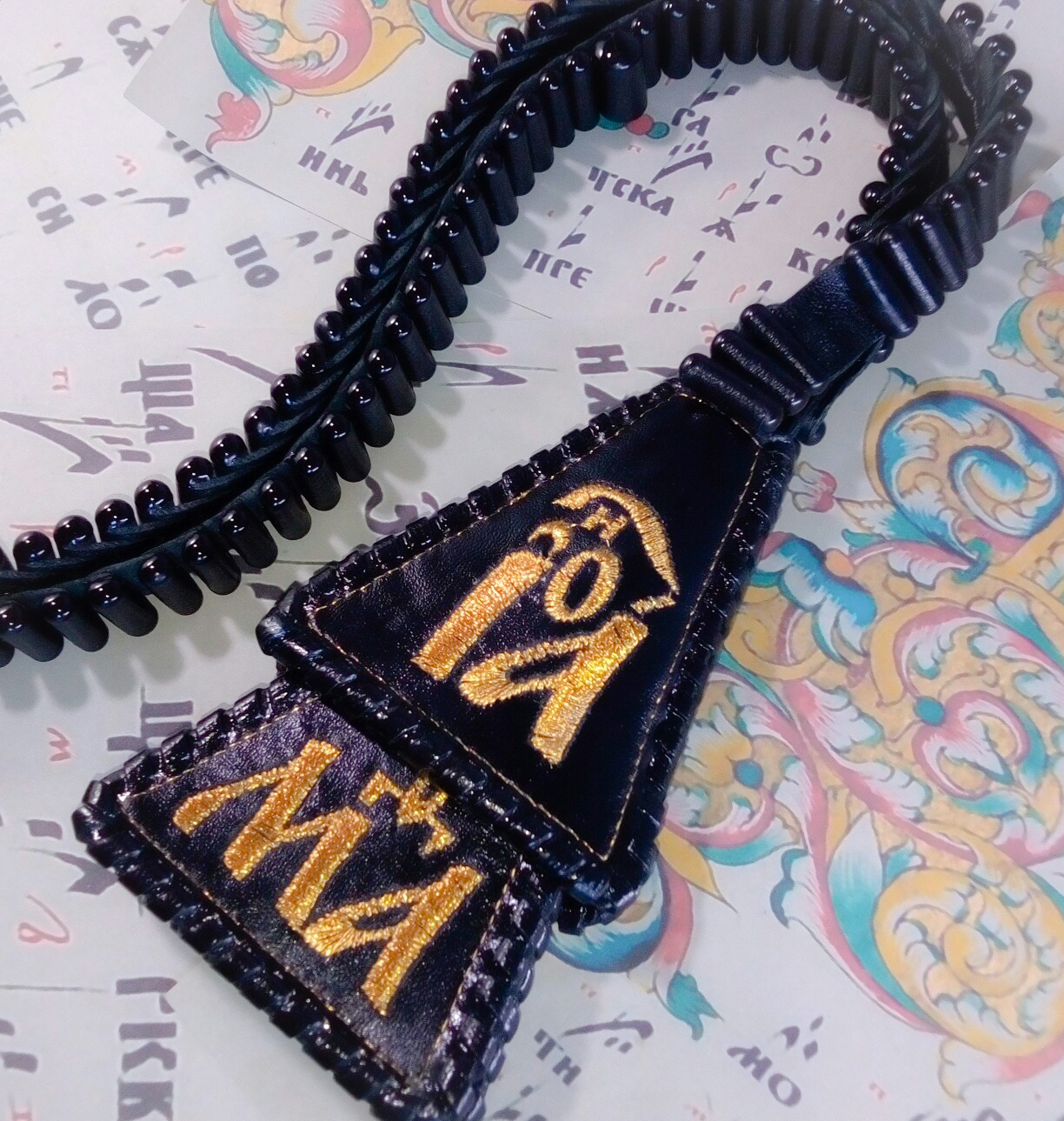 Лестовка с лигатурами Св.Ап.Евангелистов из Острожской Библии 1581